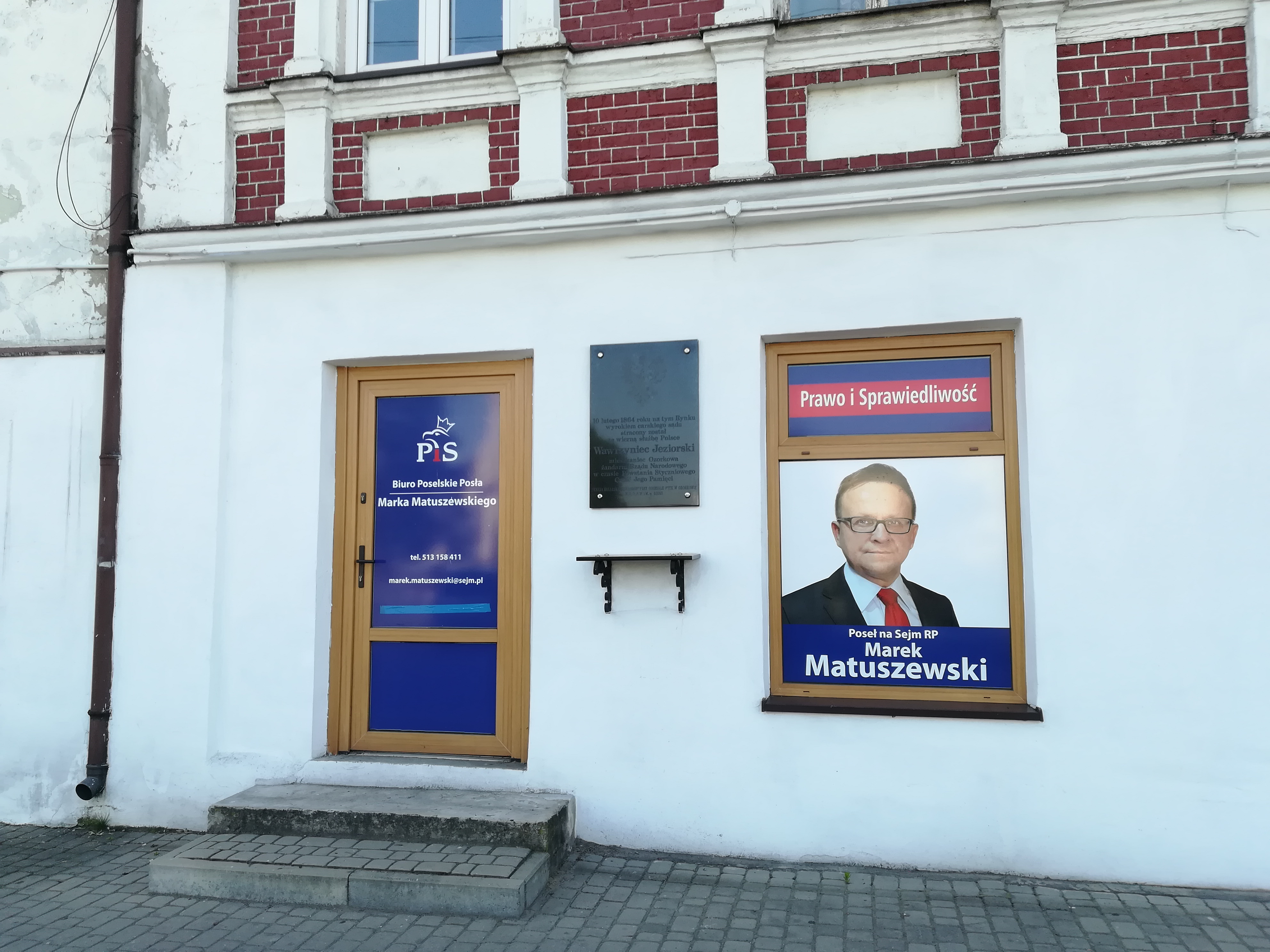 Biuro Poselskie Marka Matuszewskiego (PiS) w Ozorkowie.